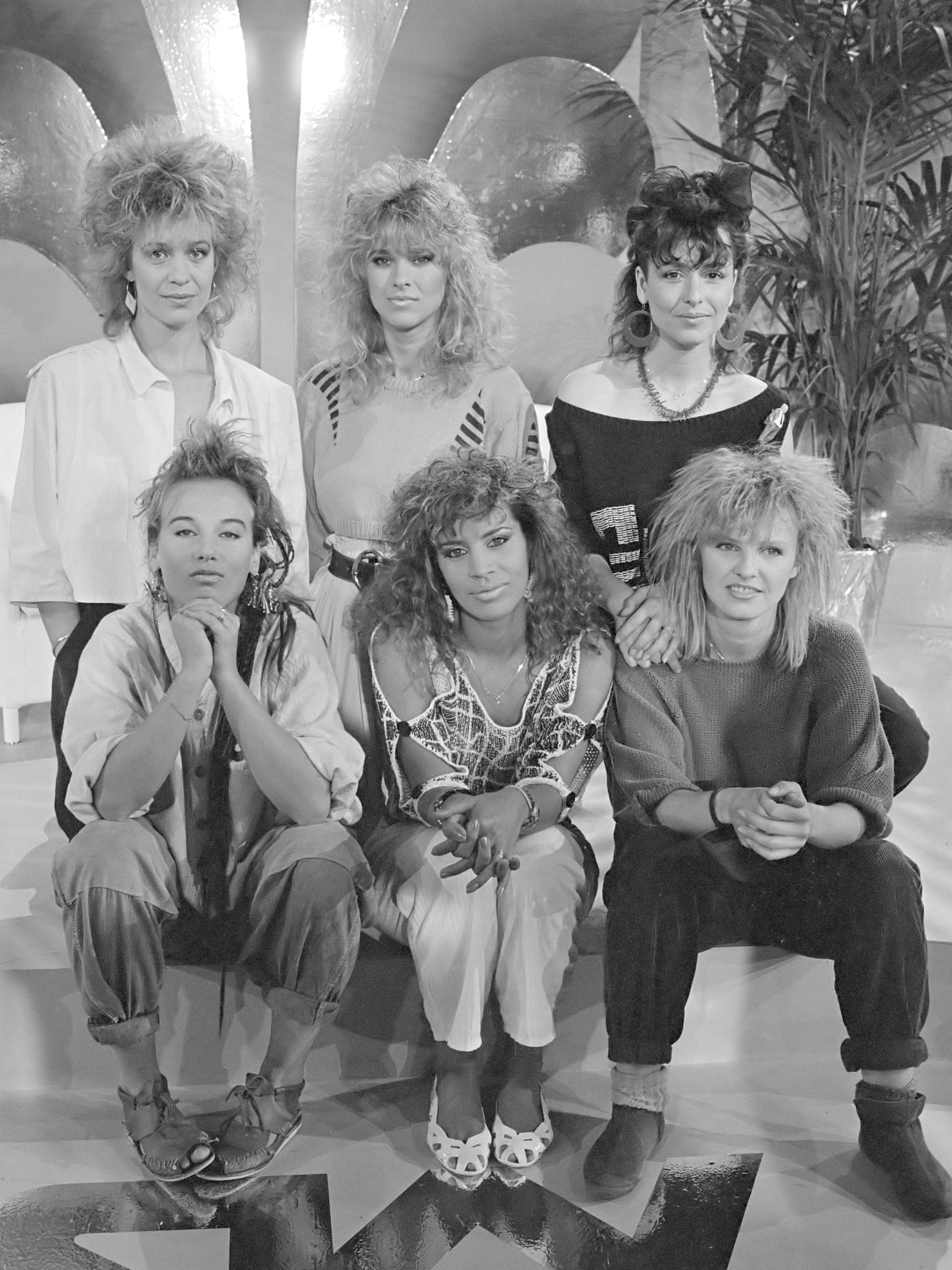 Uitzending commerciële zender Sky Channel vanuit Hilton Amsterdam 27 juni 1984